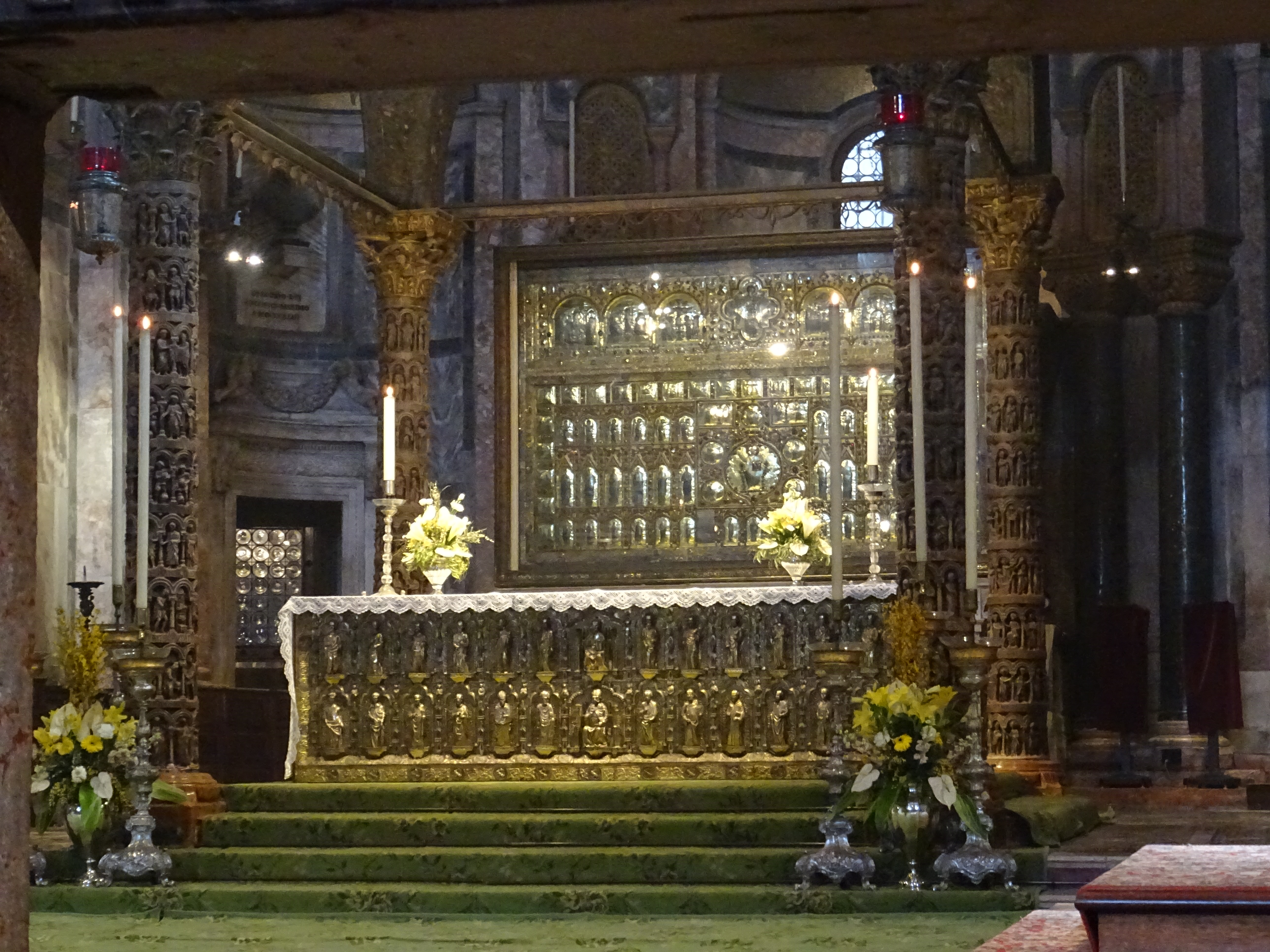 Basilique St Marc de Venise : la Pala d'Oro exposée pour l'office du dimanche